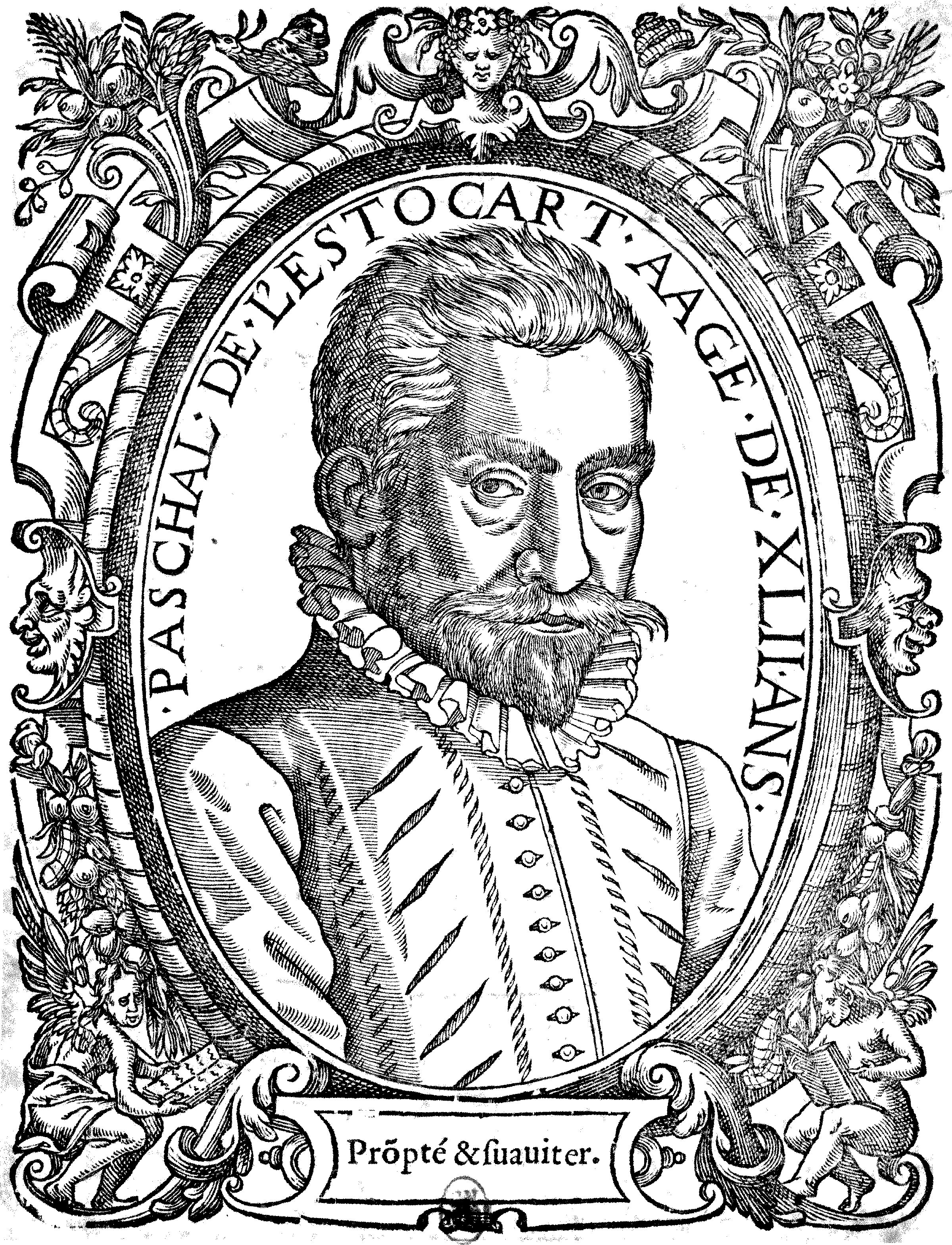 Portrait du compositeur Paschal de l'Estocart. Gravure publiée dans ses Cent cinquante Pseaumes de David en 1582.